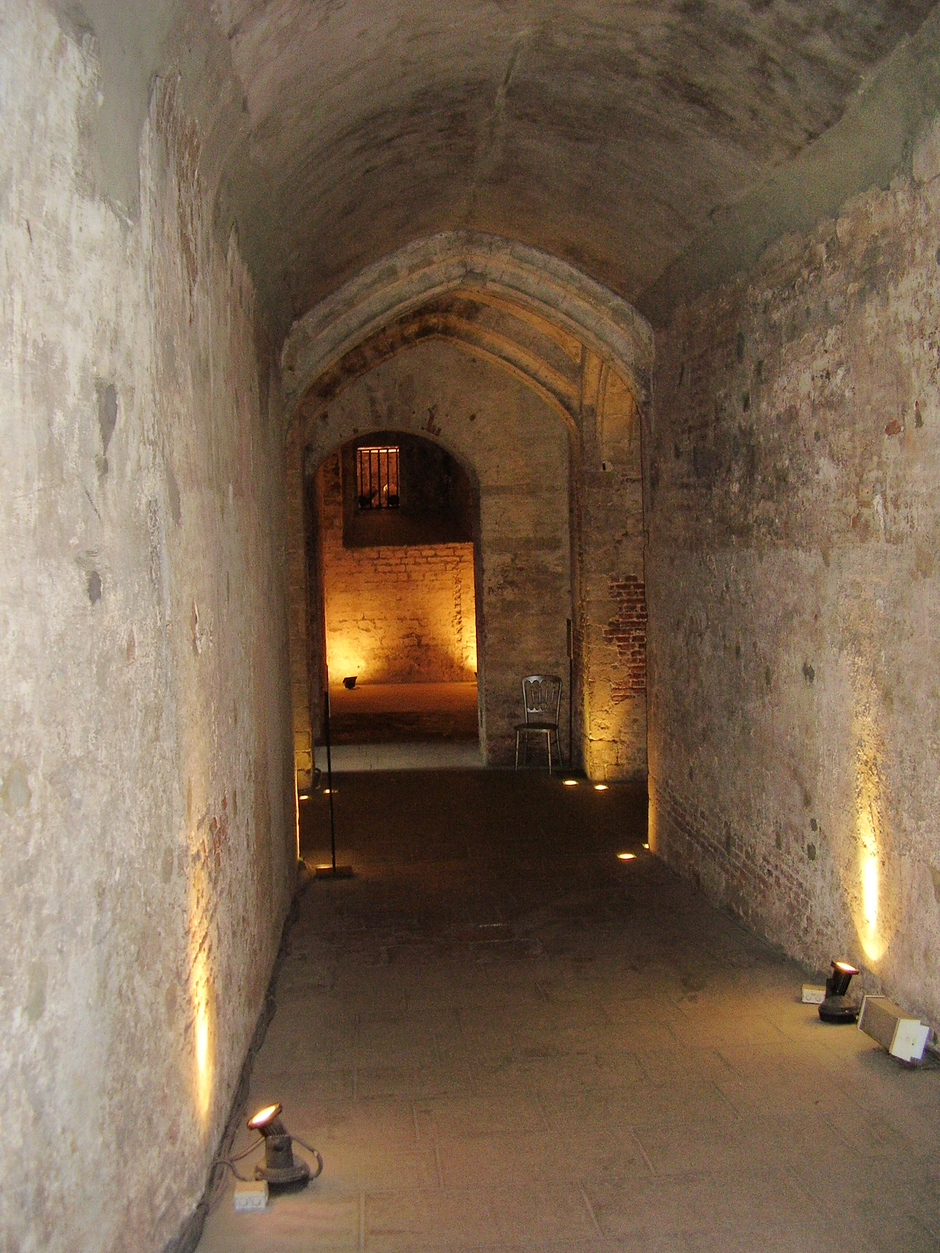 Description: Ancien Palais du Coudenberg (Bruxelles) Author: User:Ben2 Date of creation: 12 juin 2006 Source: Photo personnelle